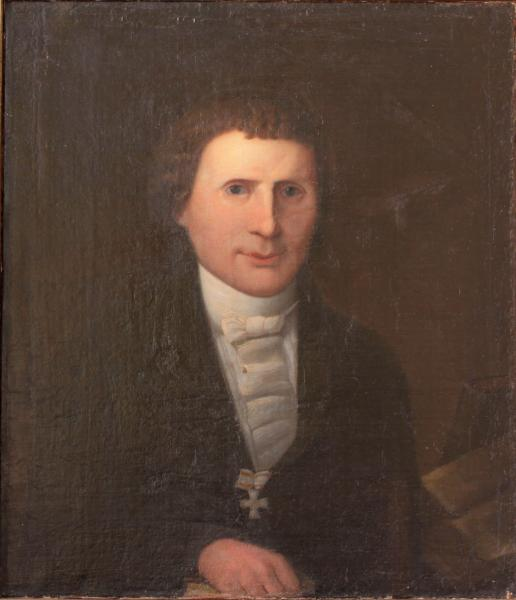 Liudvikas Martynas Gediminas Rėza (1776 m. sausio 9 d. – 1840 m. rugpjūčio 30 d.) – kuršininkas, prūsų lietuvių visuomenės veikėjas, lituanistas, teologas, tautosakininkas, Karaliaučiaus universiteto profesorius.